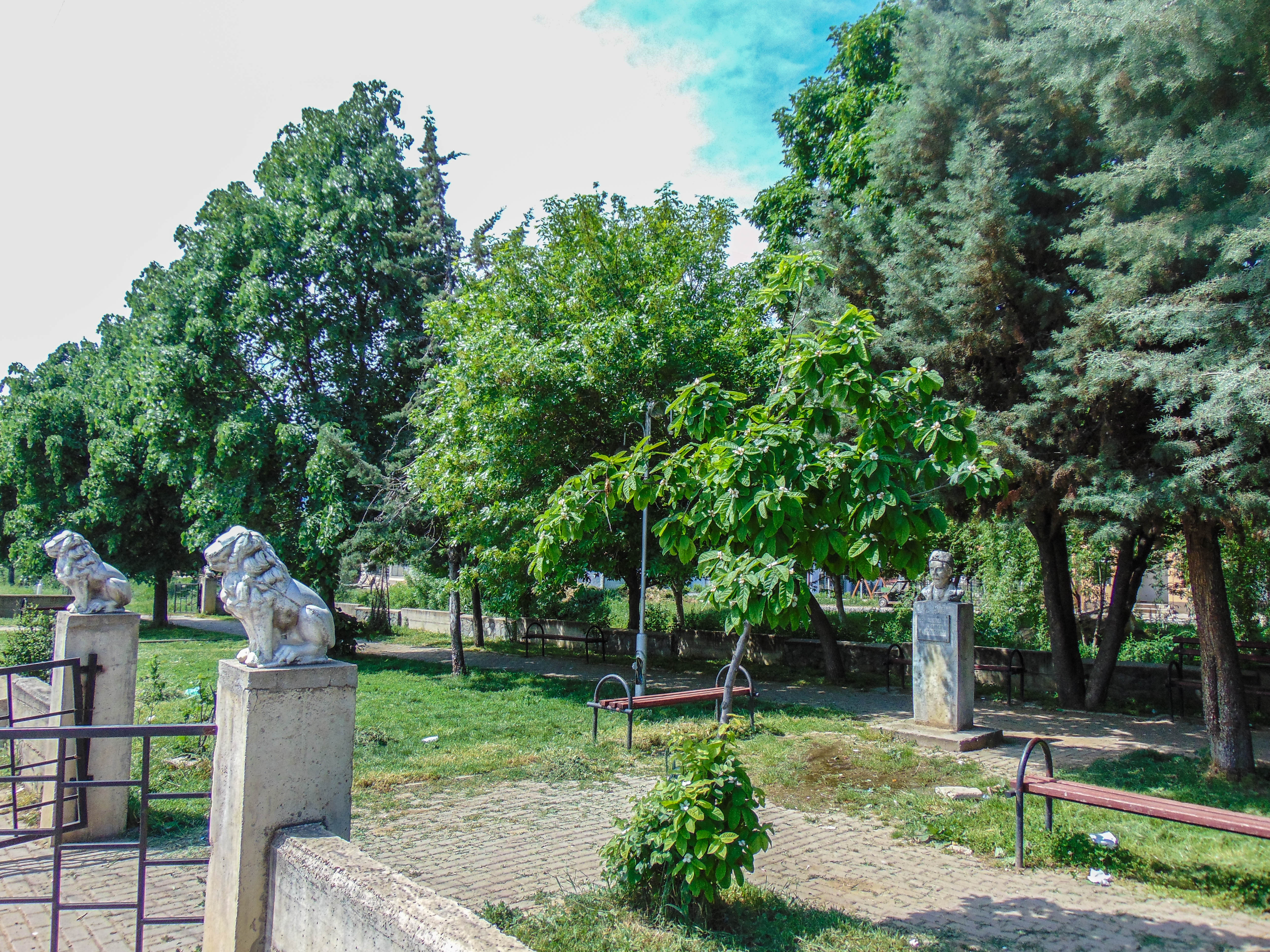 Ораовица